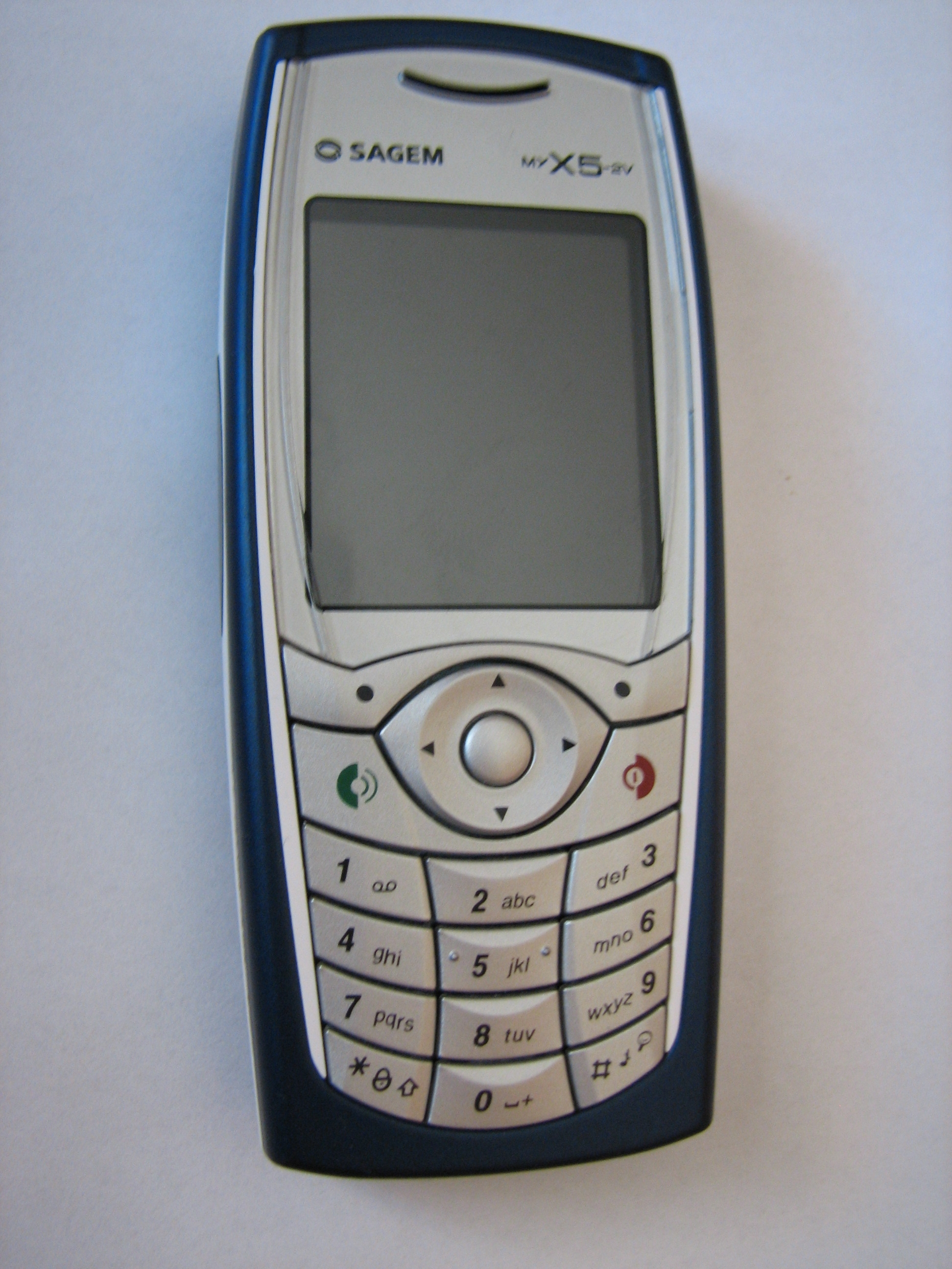 mobile phone Sagem myX5-2v